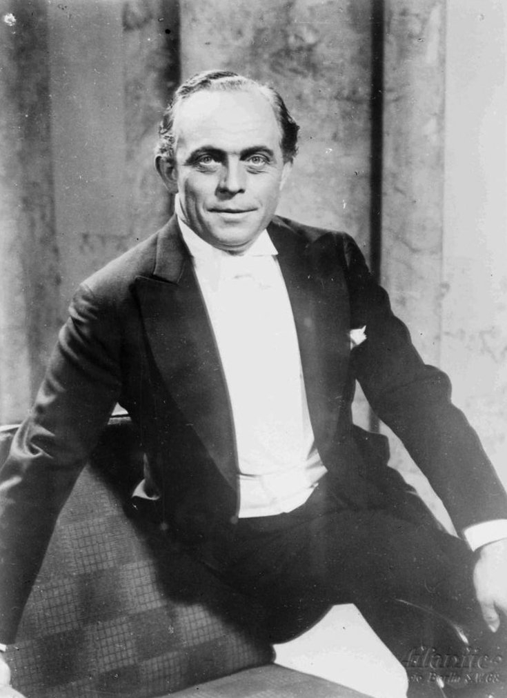 Kabarett der Komiker: Conferencier Hugo Fischer-Köppe